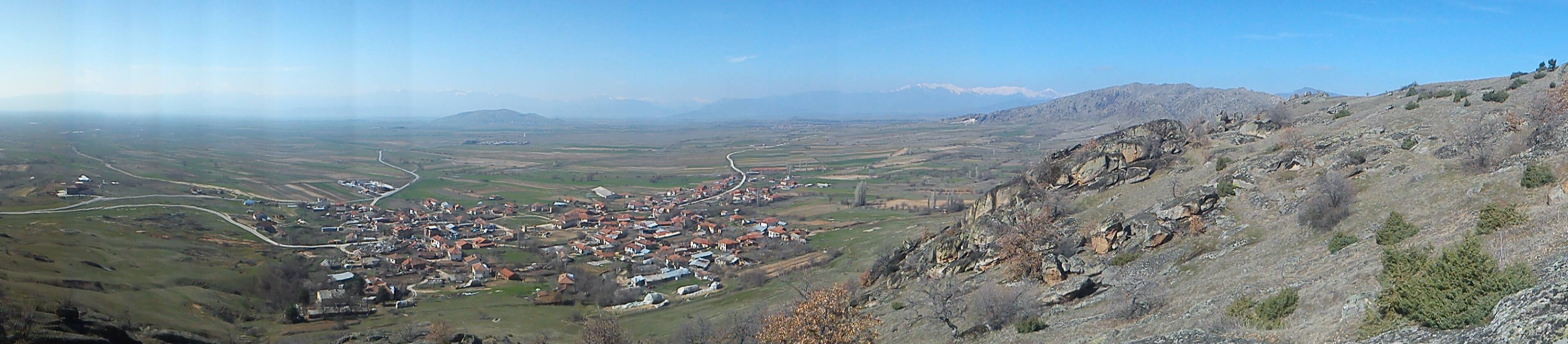 Поглед од ридот во близина на с. Мажучиште - Прилеп